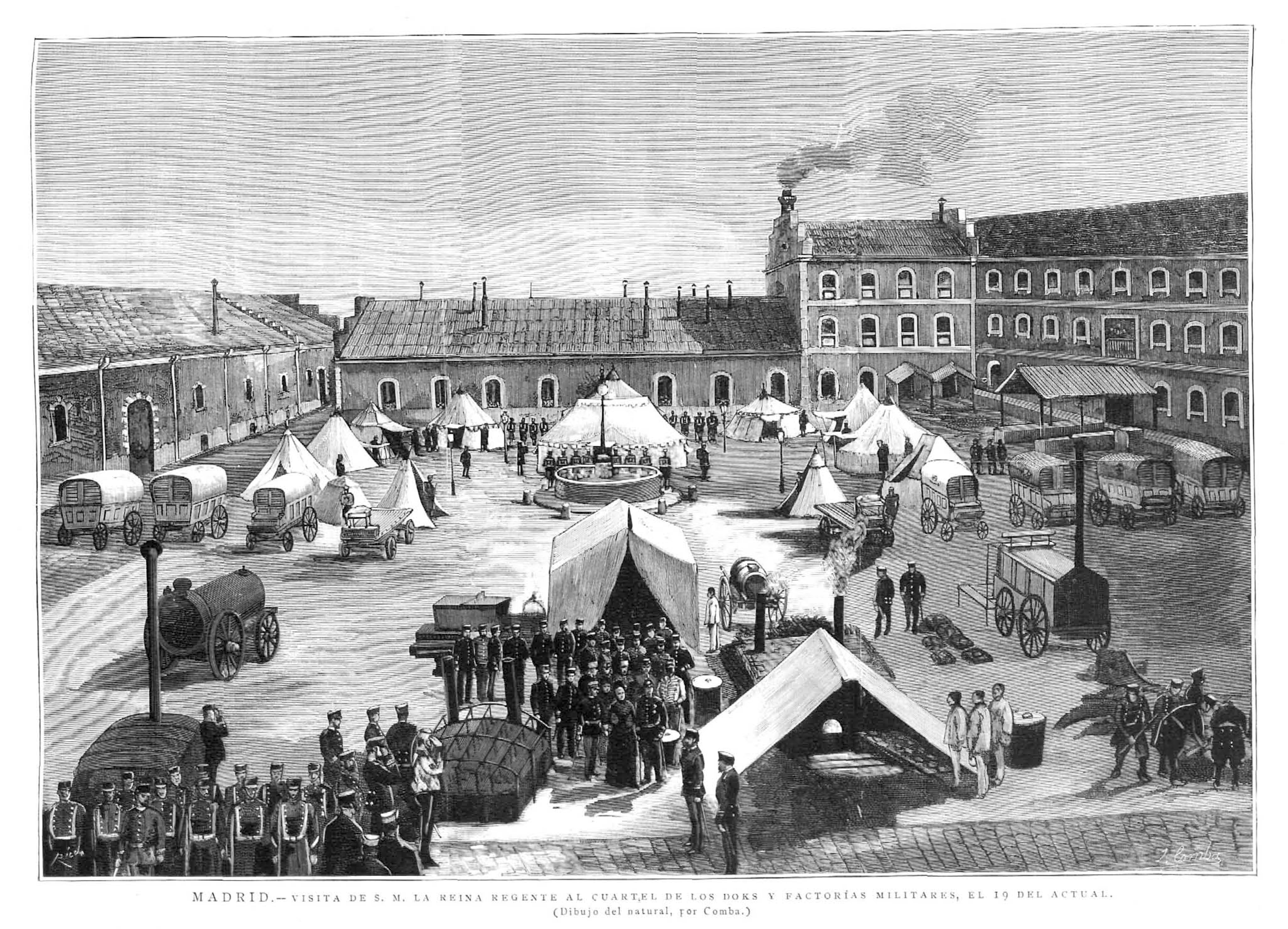 Madrid. Visita de la reina regente al cuartel de los Docks y factorías militares, el 19 del actual.